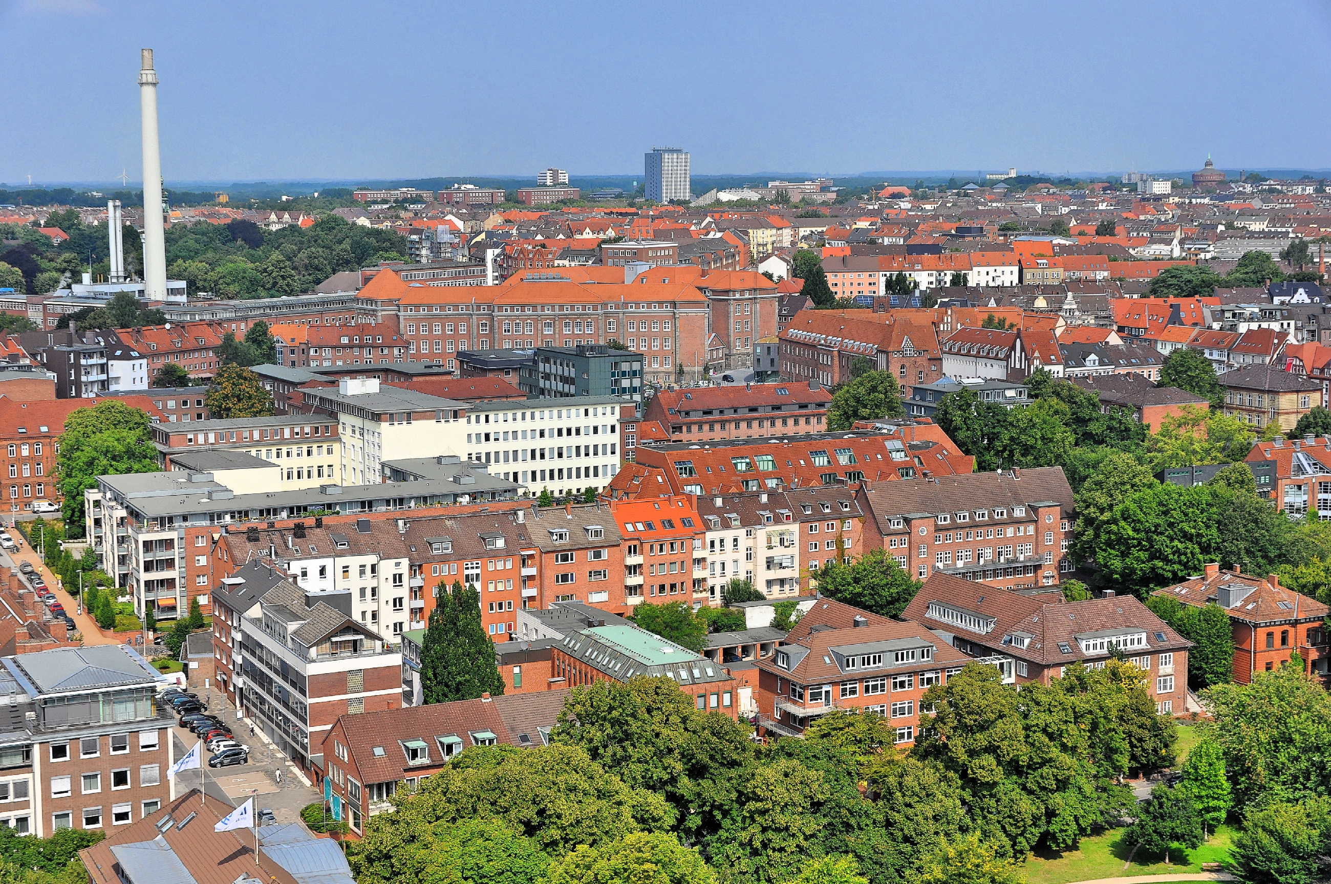 Kiel, Bilder wärend des Landtagsprojekt Schleswig-Holstein 2013